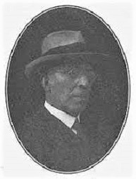 Luigi Parpagliolo